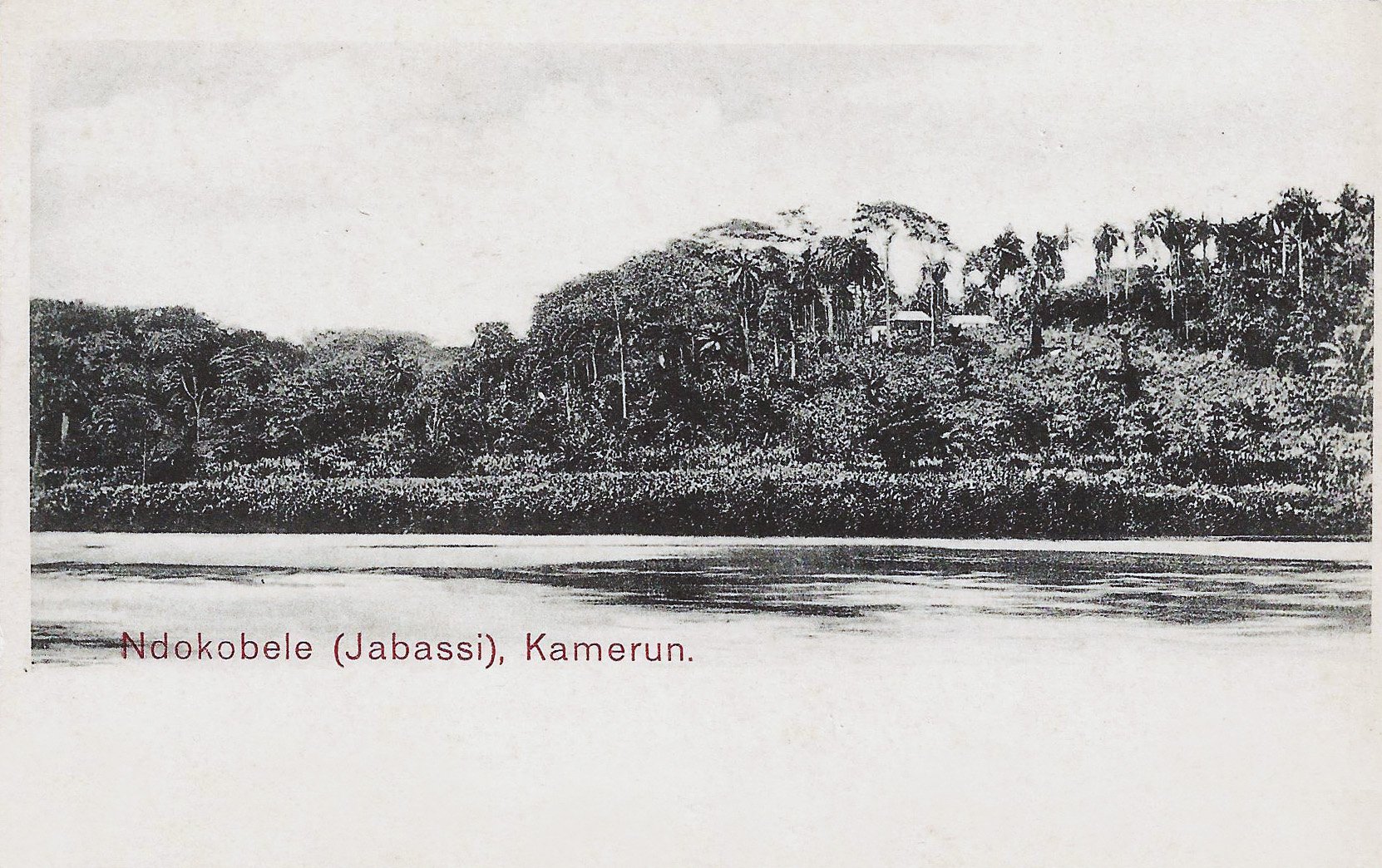 Ndokobele (Jabassi). Kamerun. pas de mention d'auteur, d'éditeur ou de date